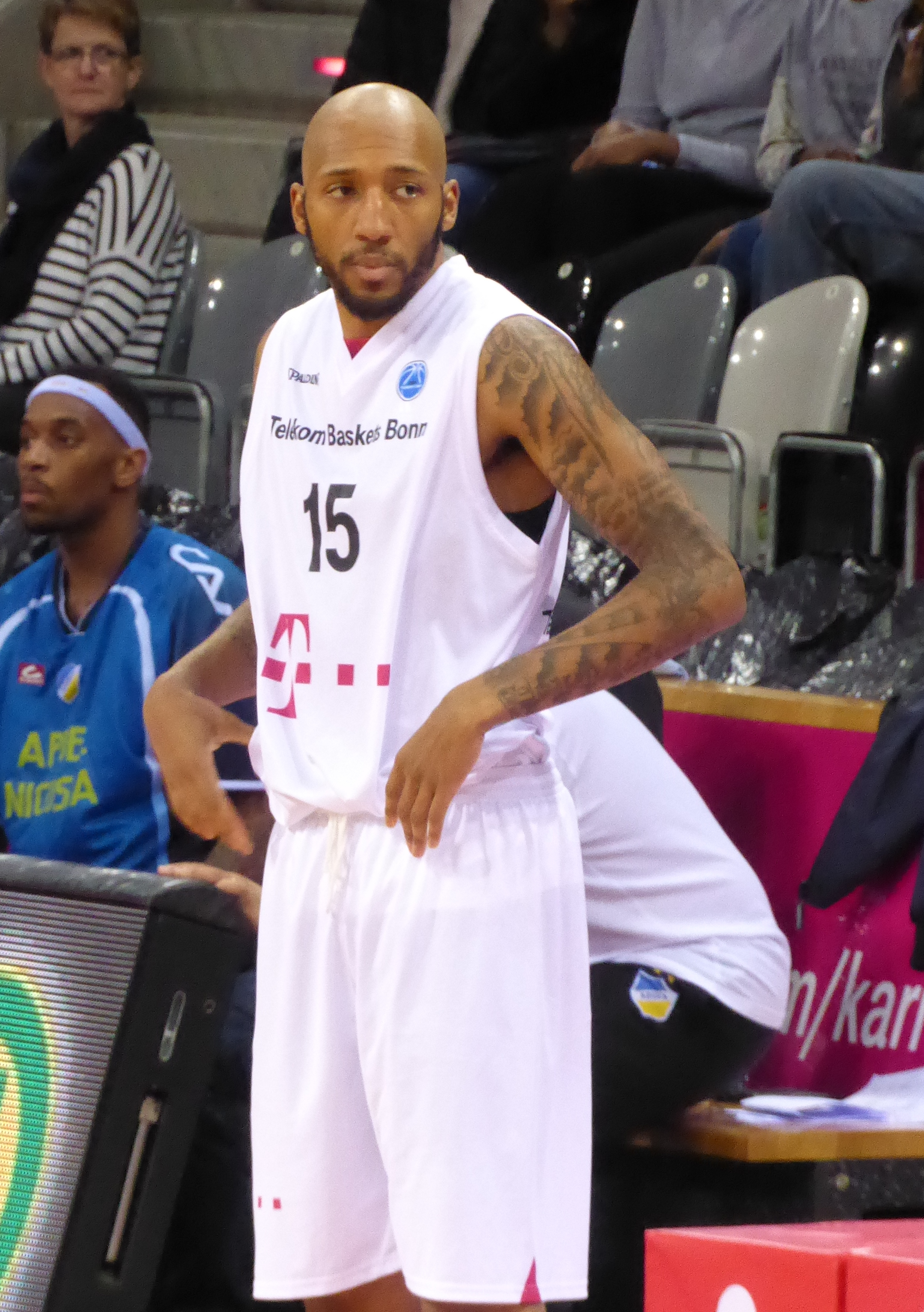 Kenneth Horton beim Spiel der Telekom Baskets Bonn gegen APOEL Nicosia am 14. Dezember 2016.